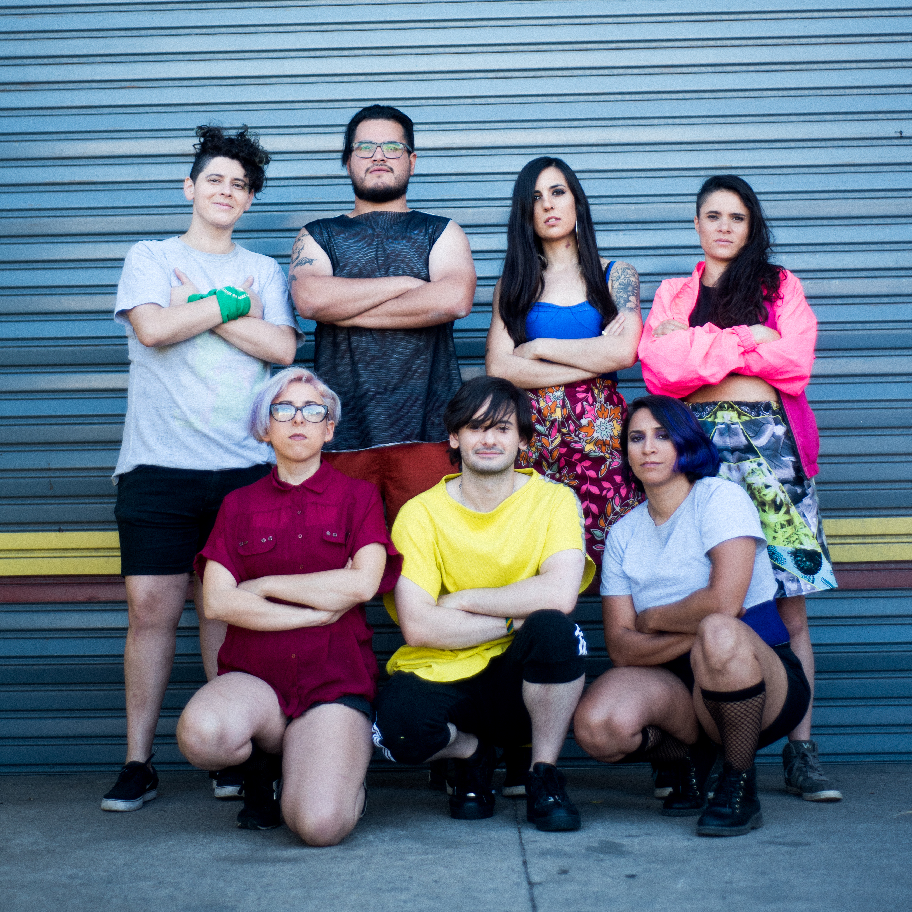 Formacion actual de Cachitas Now!